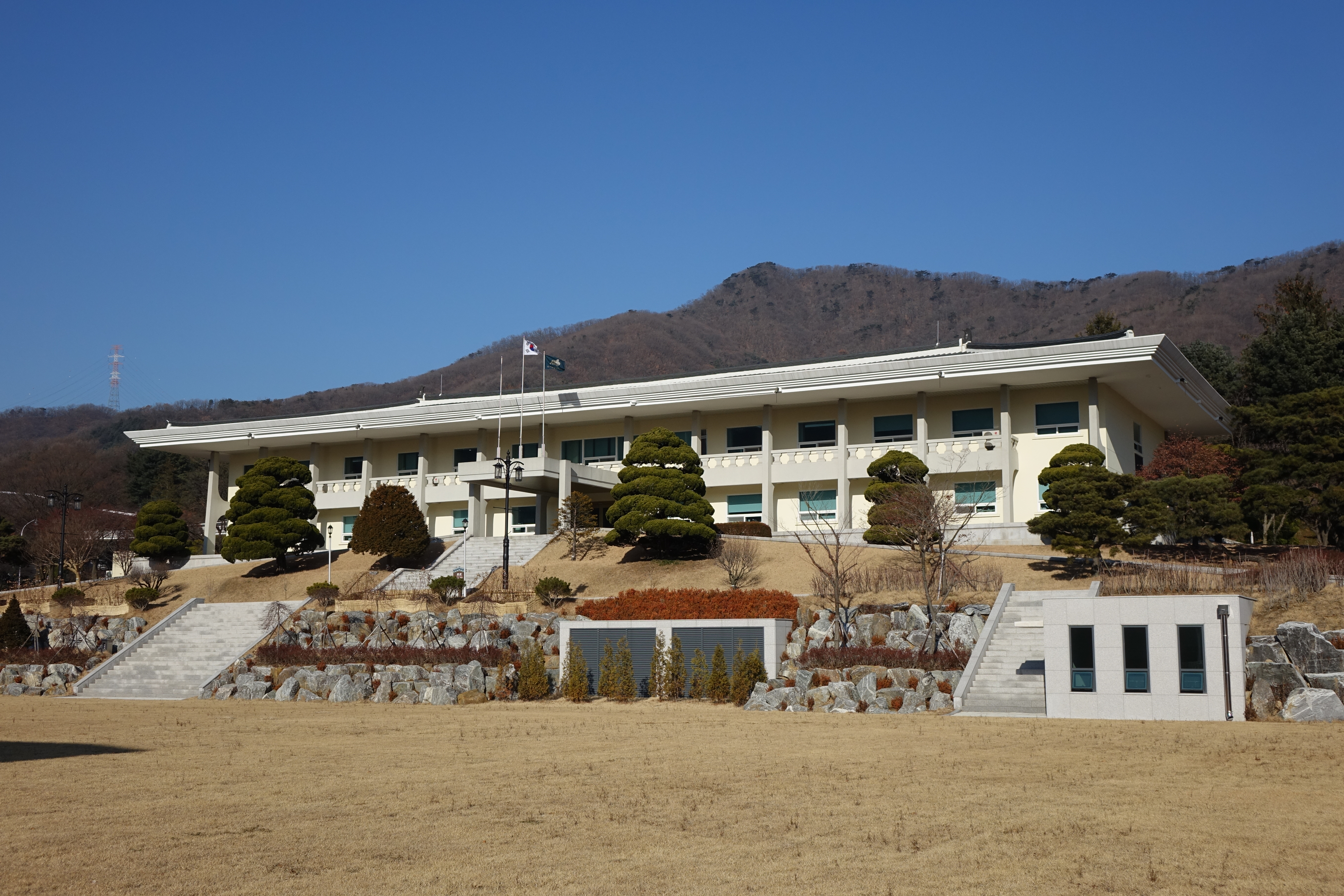 최광모 2015년 1월 13일 업로드